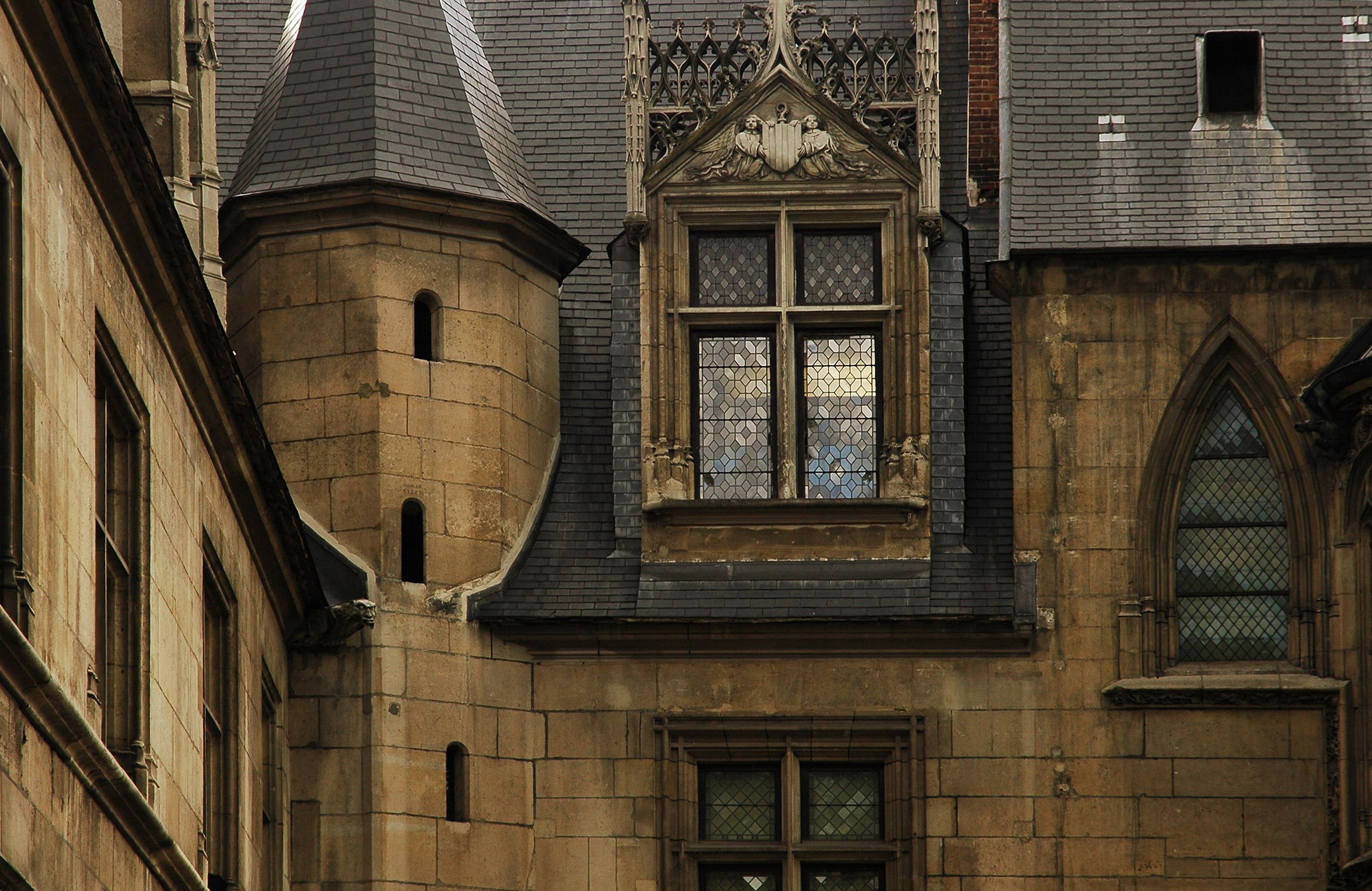 Détail de la façade nord-est (coté chapelle), de la toiture et d'une lucarne de l'hôtel des abbés de cluny (musée national du moyen âge), Ve arrondissement, Paris.